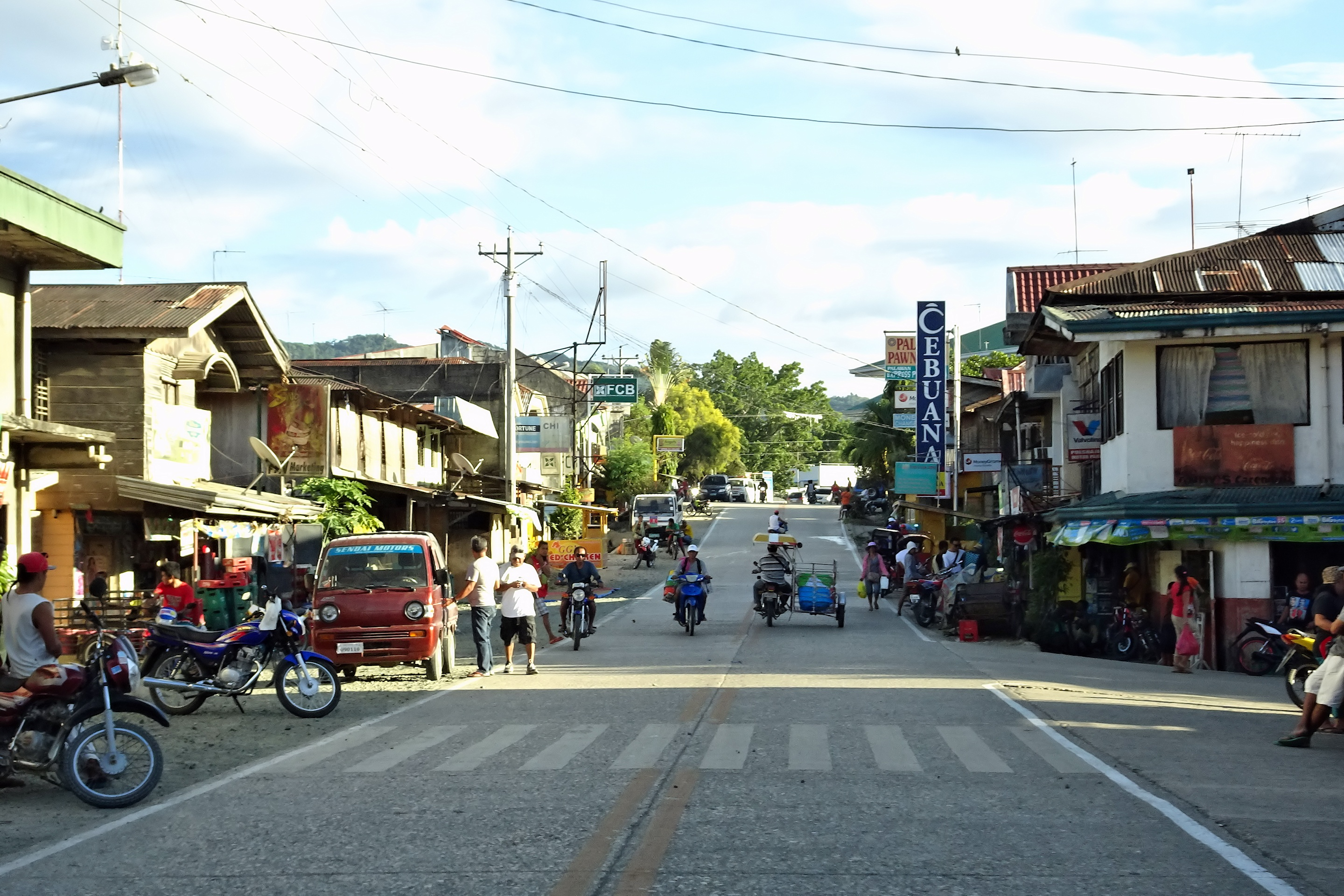 Sierra Bullones, Bohol, Philippines